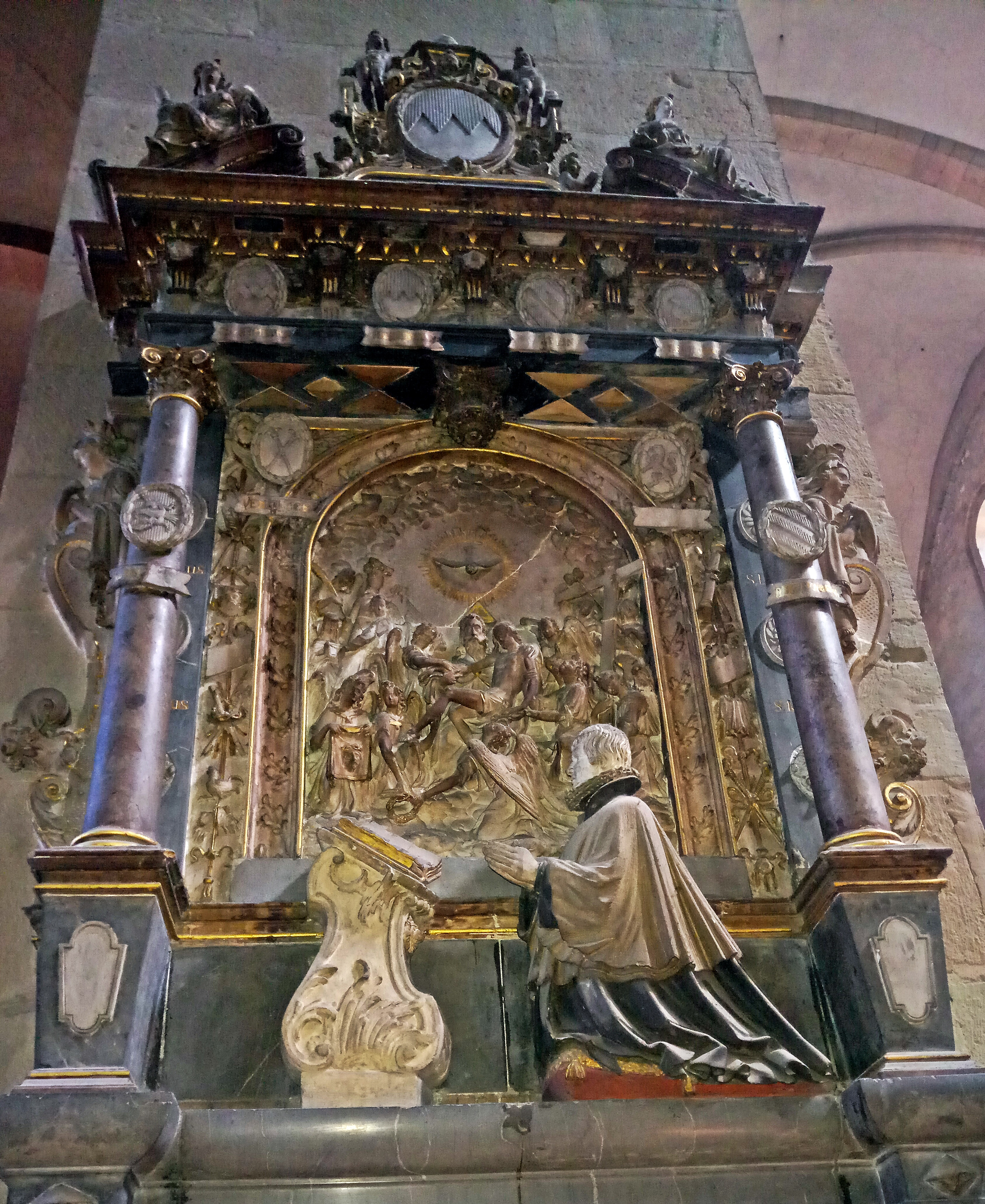 Mainzer Dom, Epitaph des Domkapitulars Wolfgang von Heusenstamm (+ 1594)